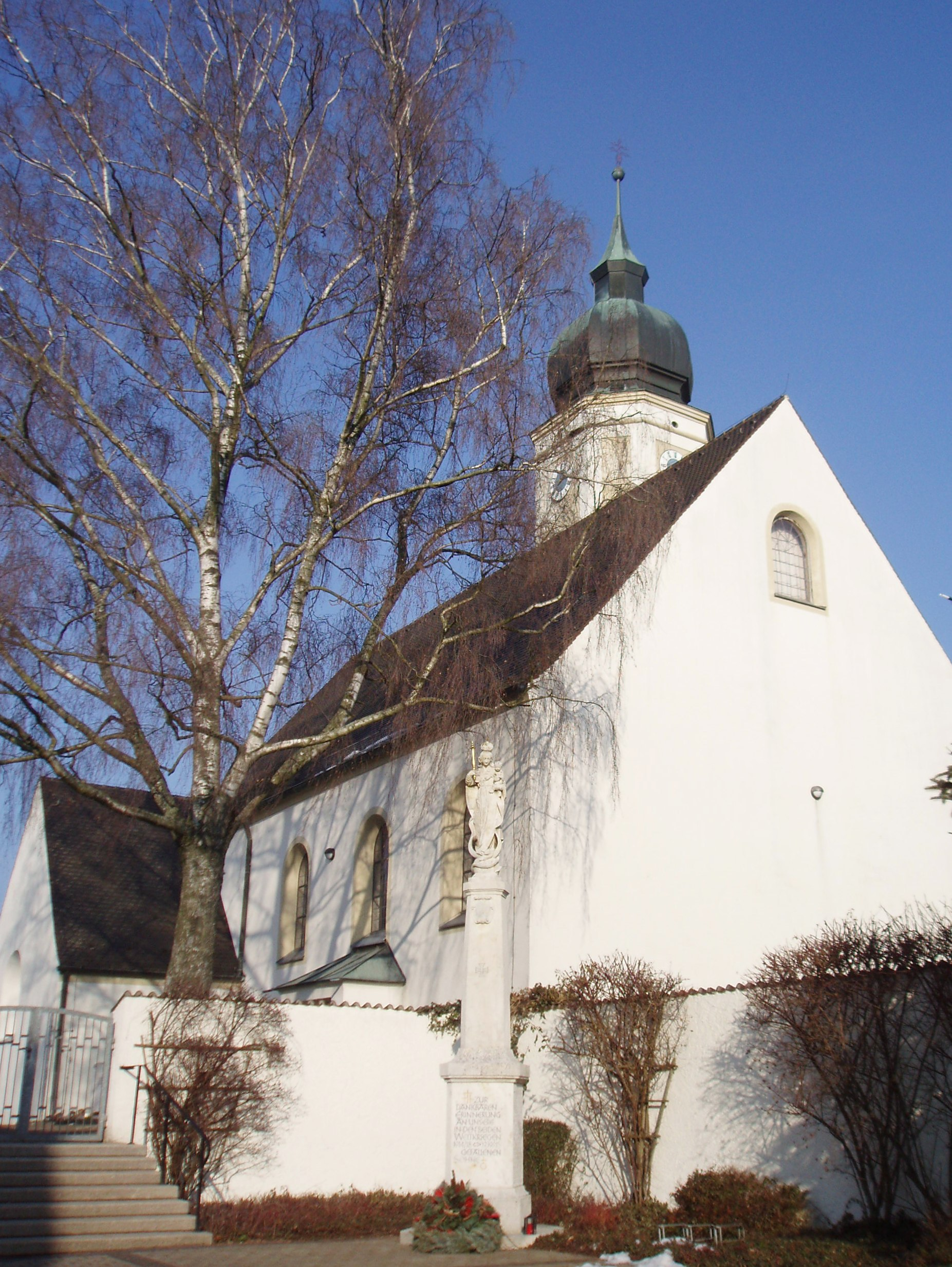 Egweil im Landkreis Eichstätt, Pfarrkirche St. Martin